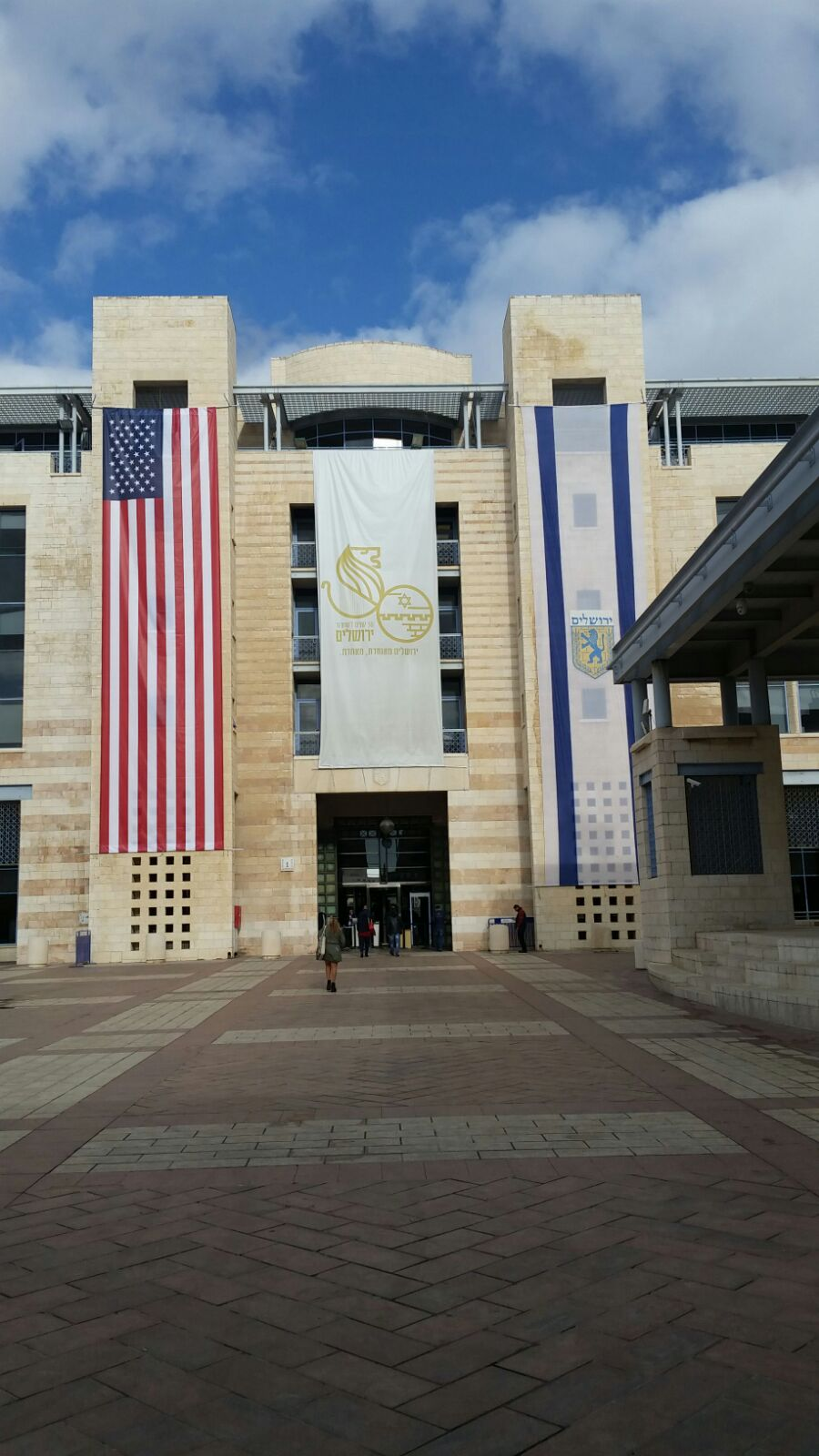 La mairie de Jérusalem pavoisées du drapeau américain au lendemain du discours de Donald Trump reconnaissant Jérusalem comme capitale d'Israël et annoncant le transfert de l'ambassade américaine de Tel Aviv à Jérusalem.